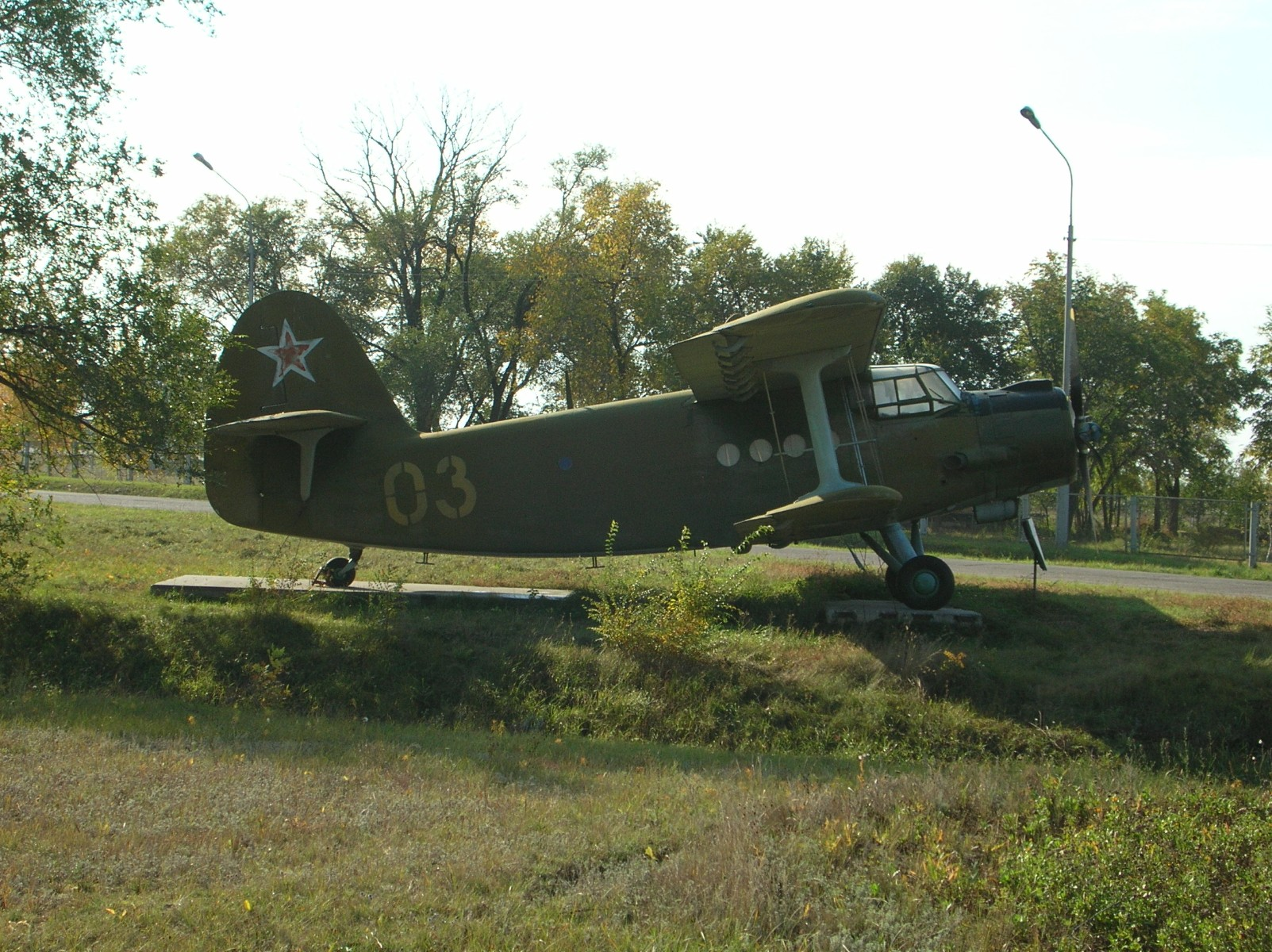 Самолёт Ан-2 на авиабазе Энгельс. Именно на этом самолете первые советские космонавты совершали свои тренировки. Музей Дальней авиации России при авиабазе Энгельс, Саратовская область, РФ.